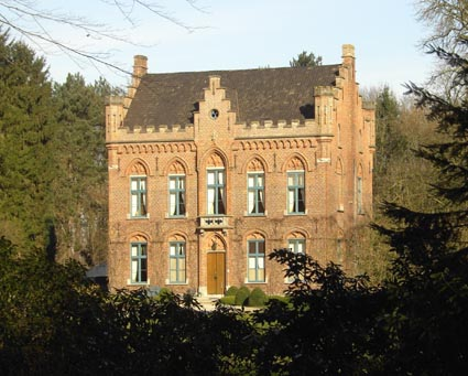 Kasteel Reesinghe - Maldegem - Oost-Vlaanderen - Vlaanderen - België